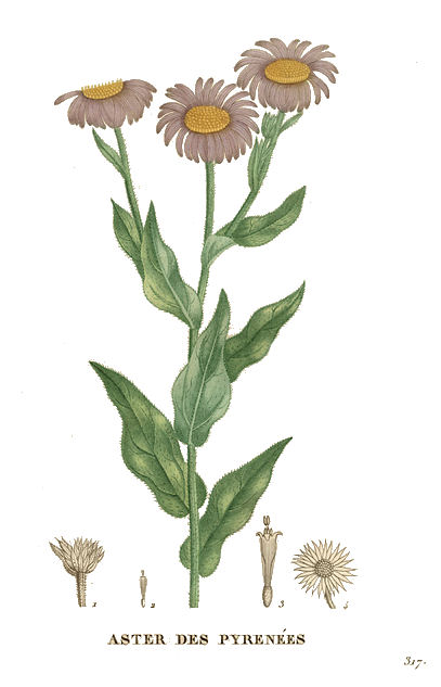 Aster Pyrenaeus: Aster of Pyrenees (english) or Aster des Pyrénées (french)